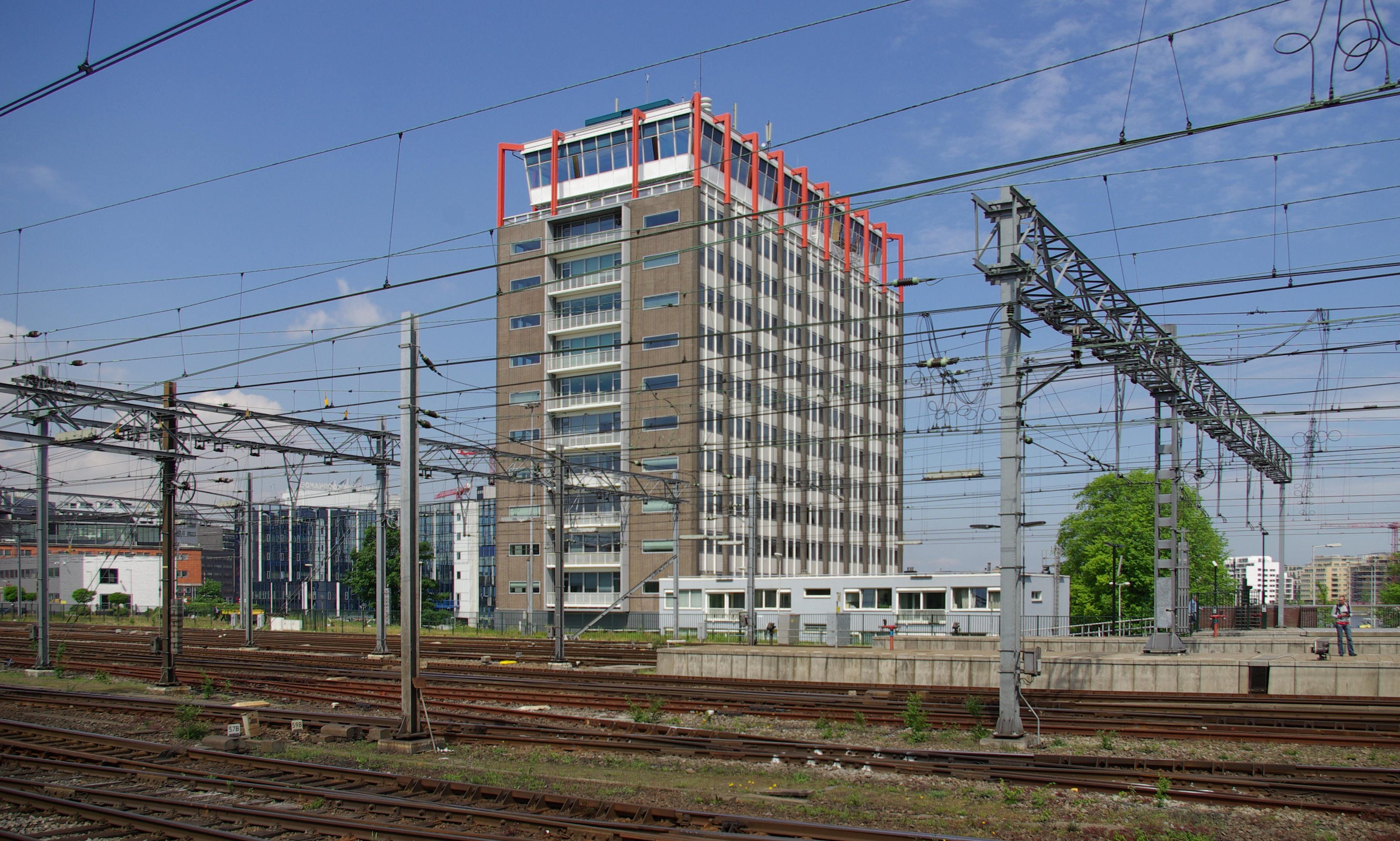 Havengebouw in Amsterdam